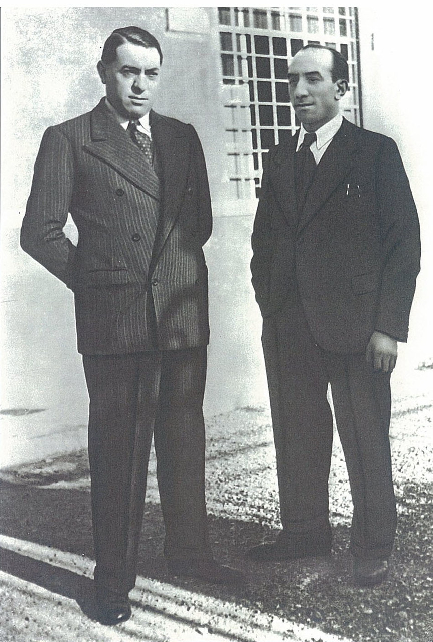 Francesco ed Eugenio Cassani